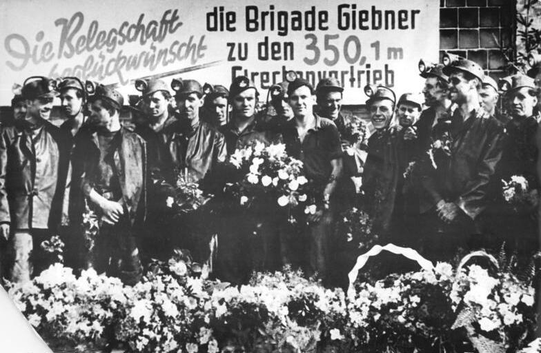 Bergarbeiter, Ehrung, Gruppenfoto Zentralbild Braun Wjtk-Wi. 7.4.1954 Rekordleistung der Wismutbrigade Giebner. Eine Heldentat der Arbeit vollbrachten die Kumpel der Brigade Giebner des Wismutbergbaus im Gebiet Freital zu Ehren des IV. Parteitages der SED. Sie erhöhten den bisherigen Wismutrekord im eingleisigen Schnellstreckenvortrieb von 300,2 Metern auf 350,1 Meter. Die Brigademitglieder hatten sich Anfang März das Ziel gesetzt, bis Monatsende erstmalig die 350-Meter-Grenze auf einer Kohlenstrecke bei vollem Ausbau zu erreichen. UBz: Die Brigade Giebner nach ihrer Rekordleistung.